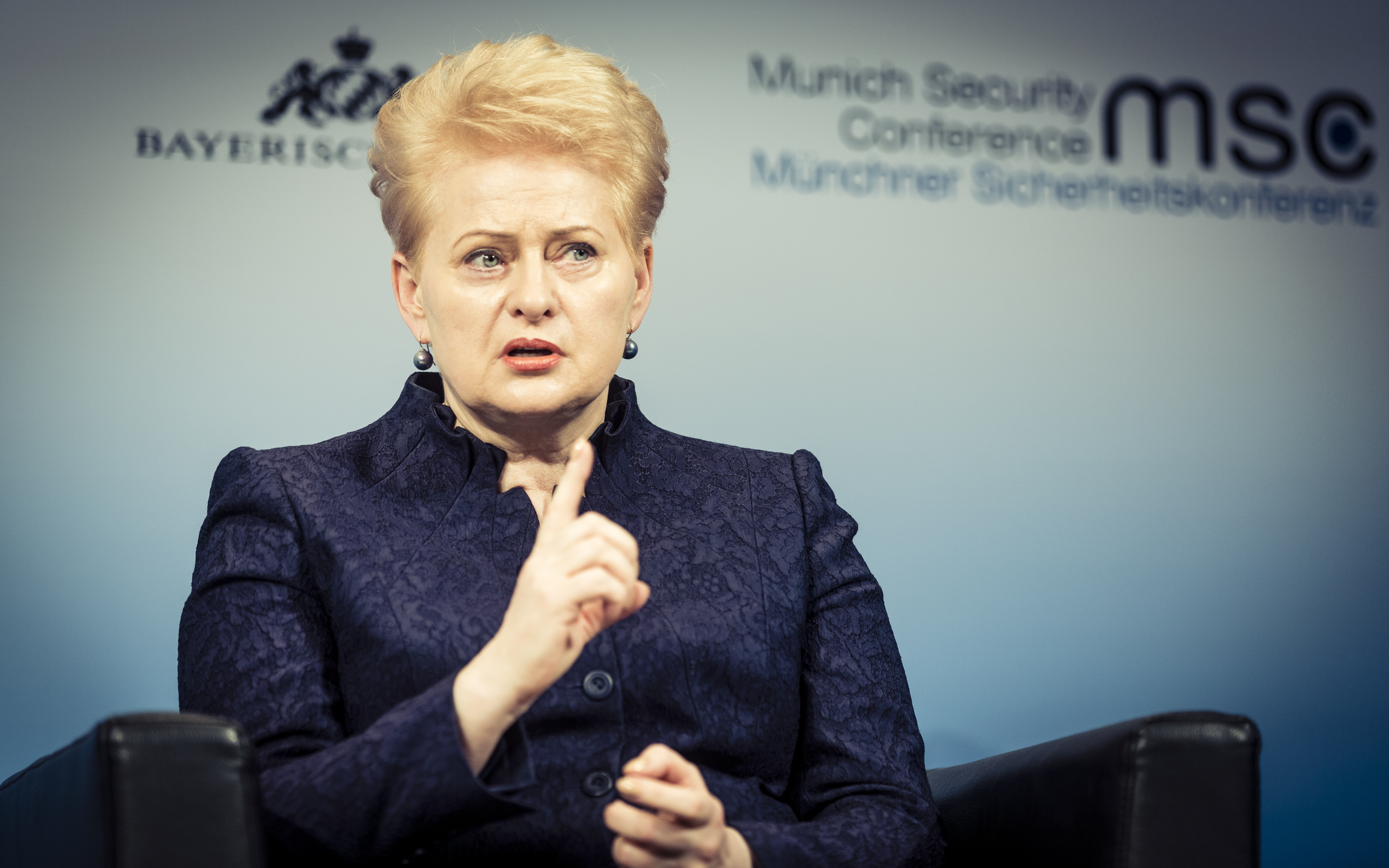 Dalia Grybauskaitė während der Münchner Sicherheitskonferenz 2017